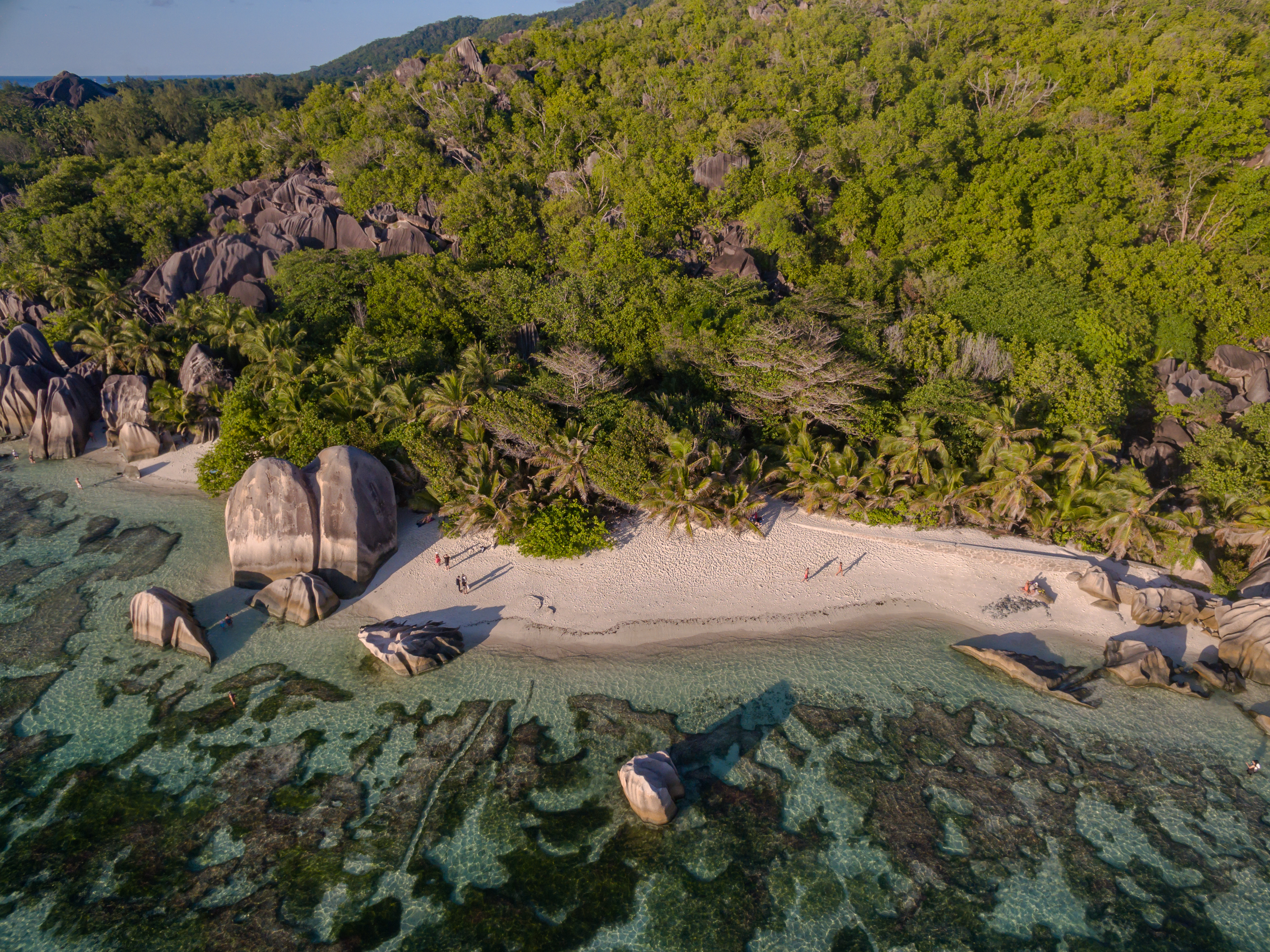 Anse Source d'Argent beach aerial La Digue, Seychellen